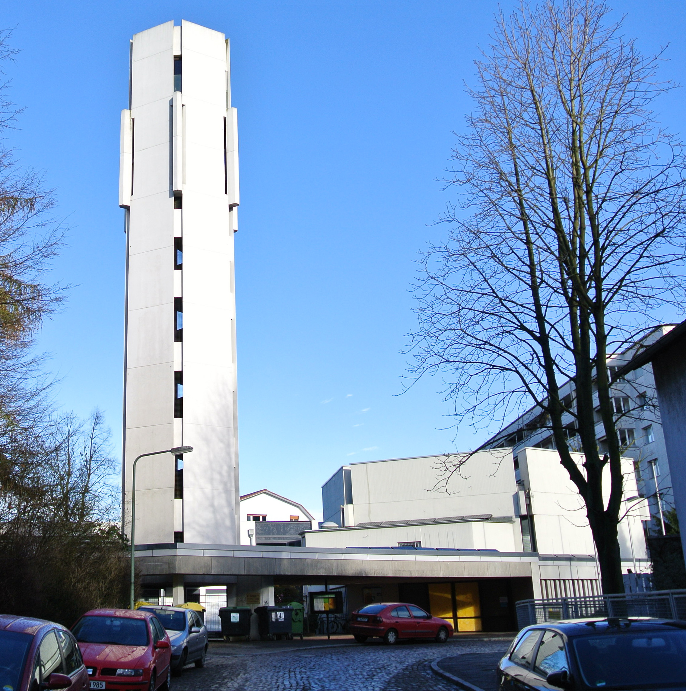 Neue Bethlehemkirche in Frankfurt-Ginnheim von Klaus-Peter Heinrici aus dem Jahr 1971